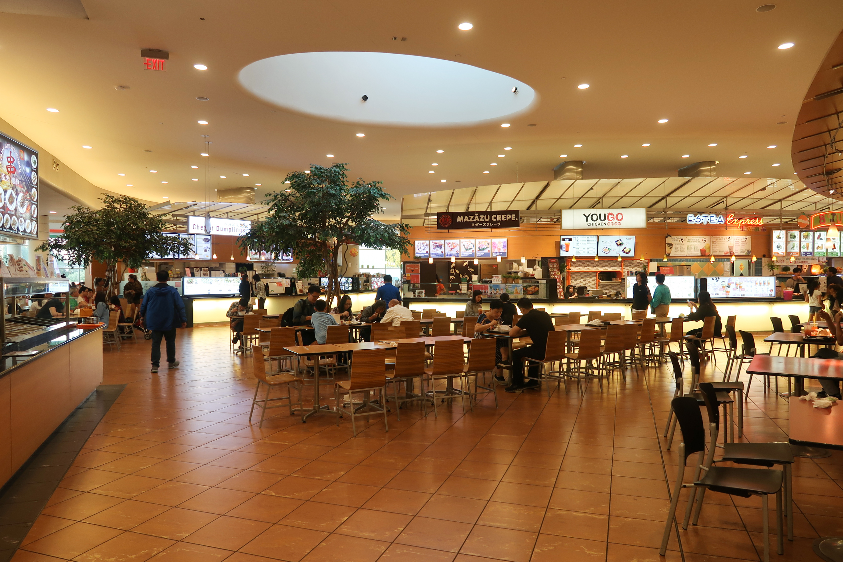 Aberdeen Centre Food Court